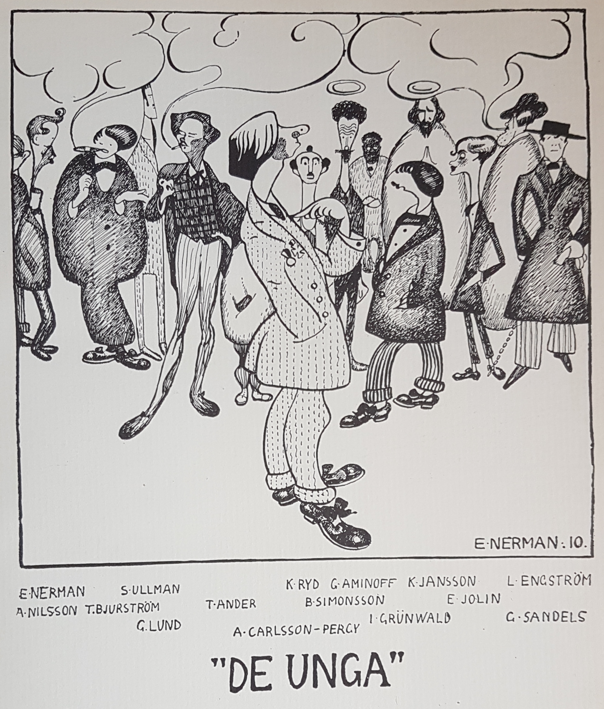 De Unga teckning i konstnärsfolk inför utställning 1910 skapad av Einar Nerman, avfotograferad bild från Allhems Svenskt konstnärslexikon.